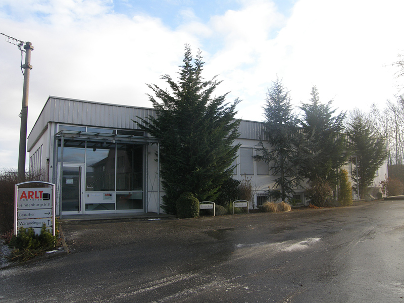 Arlt